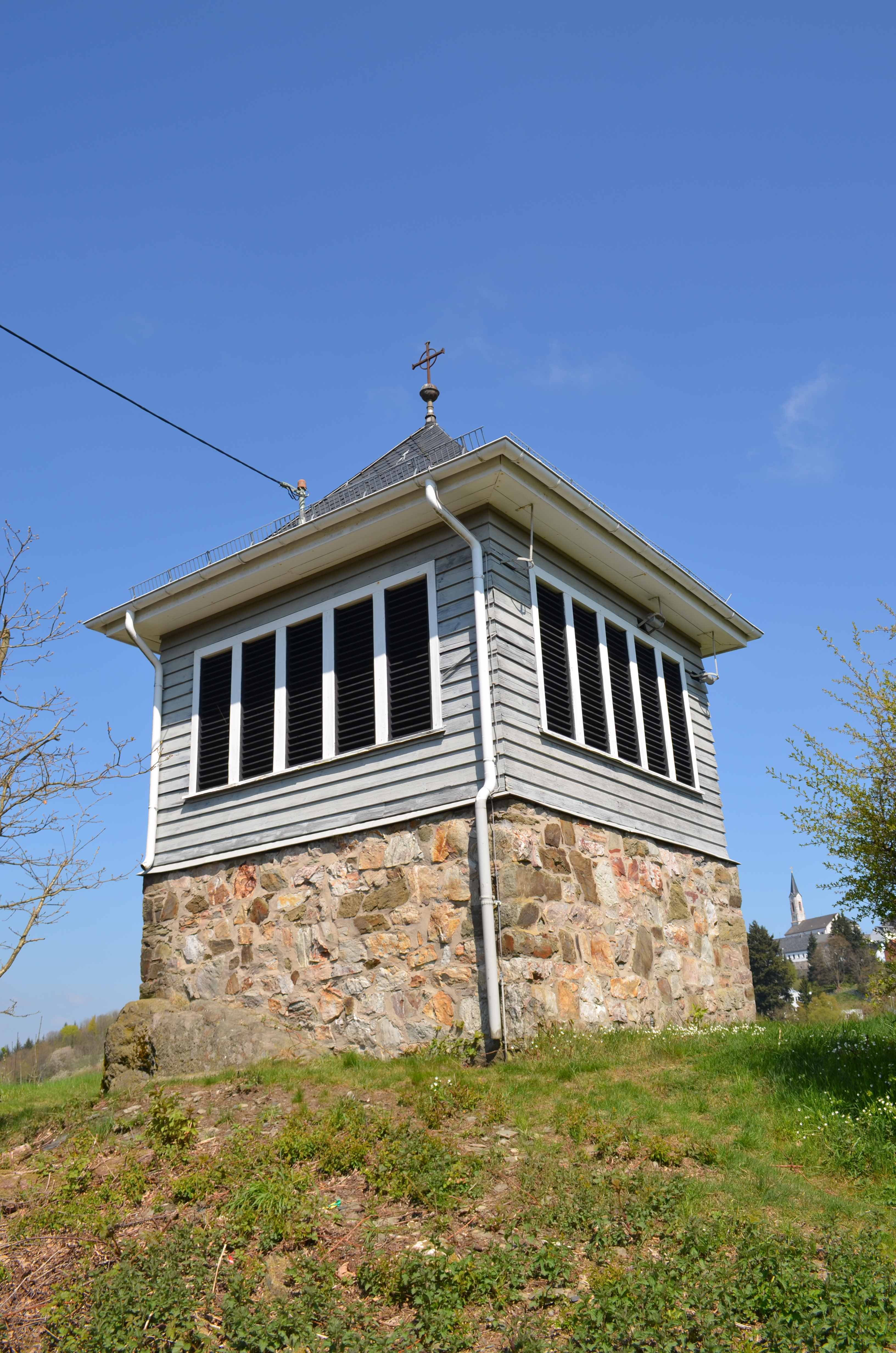 Niederreifenberg, Glockenturm